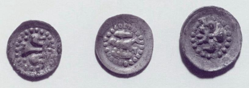 Straßburger Silberpfennige aus Wittelbacher Kirche